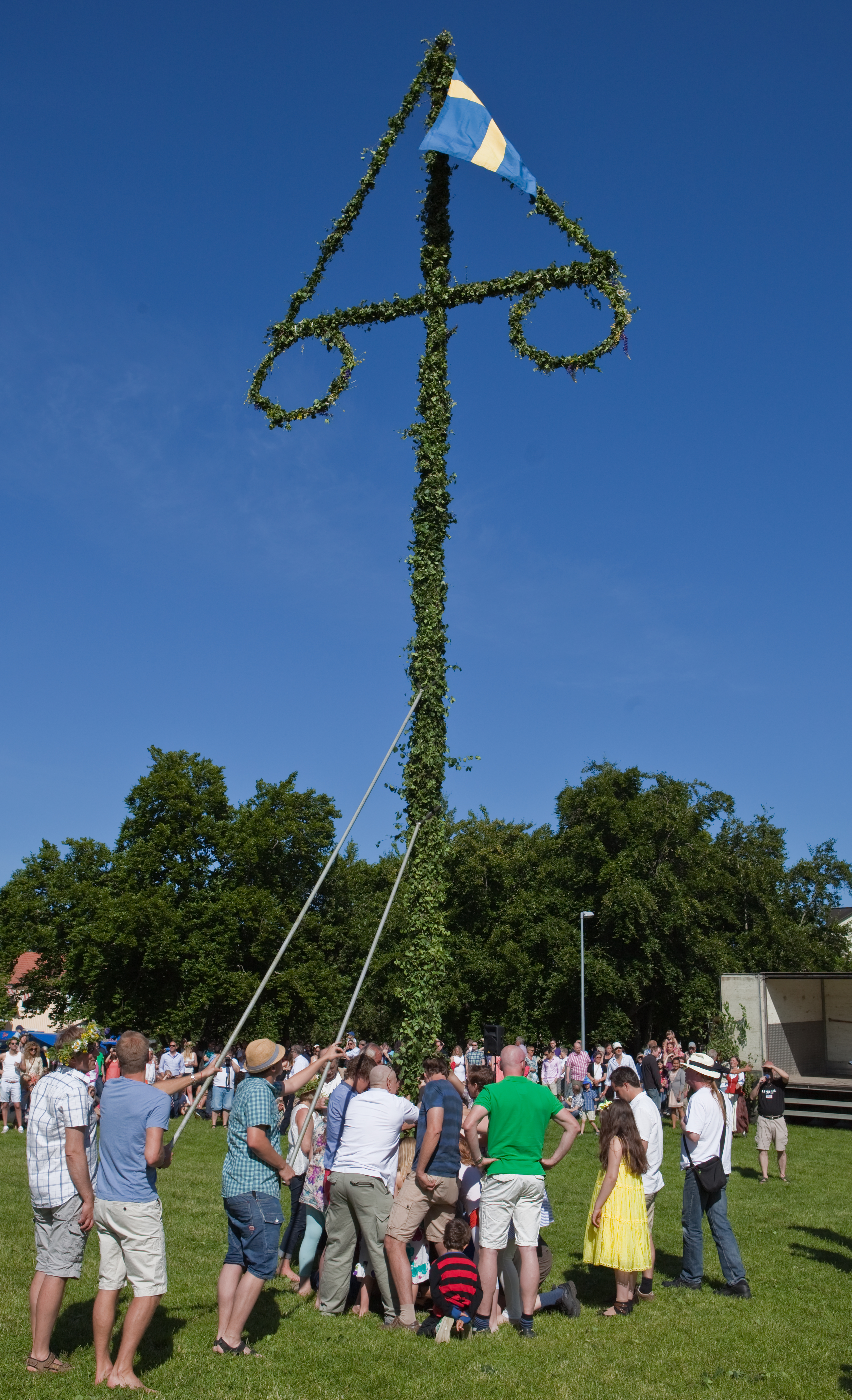 Midsummer's Eve Vaxholm June 2012